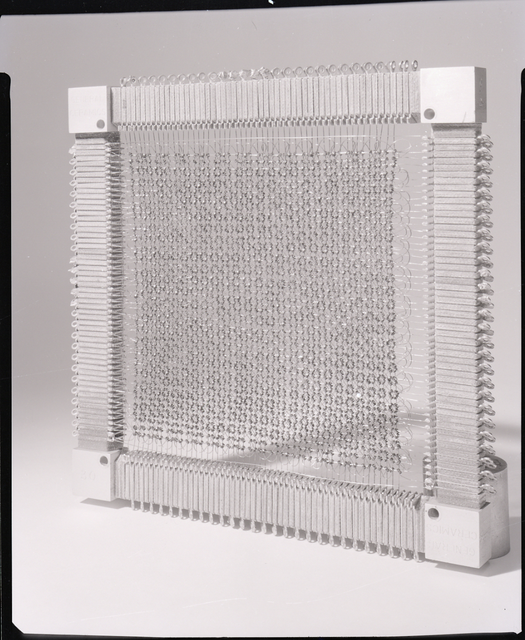 Servizio fotografico : Italia, 1960 / Paolo Monti. - Buste: 2, Fototipi: 2 : Negativo b/n, gelatina bromuro d'argento/ pellicola ; 12,5x8,5. - ((Serie costituita da 2 buste sciolte di negativi identificati con i nn.: 22503, 22504. - Sulla busta identificata con il n. 22503 iscrizione didascalica manoscritta a pennarello: "Elea/ Memoria magnetica".